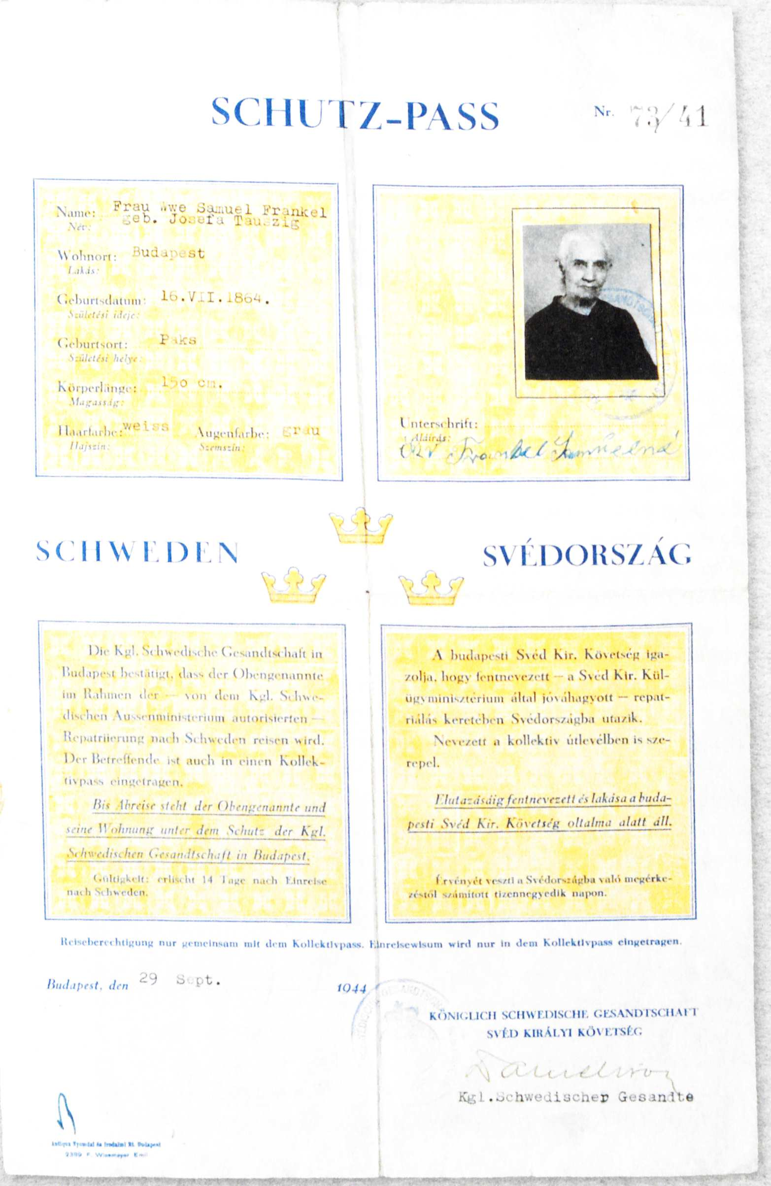 Raoul Wallenberg Schutzpass 29. September 1944 für Josefa Frankel, geborene Tauszig unterschrieben von Ivan Danielsson, links unten paraphiert von Wallenberg